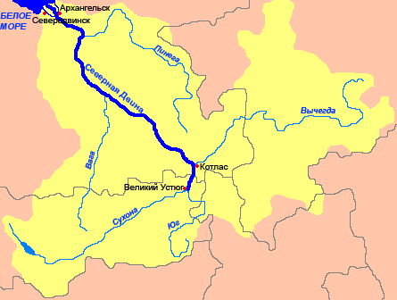 Схема бассейна Северной Двины